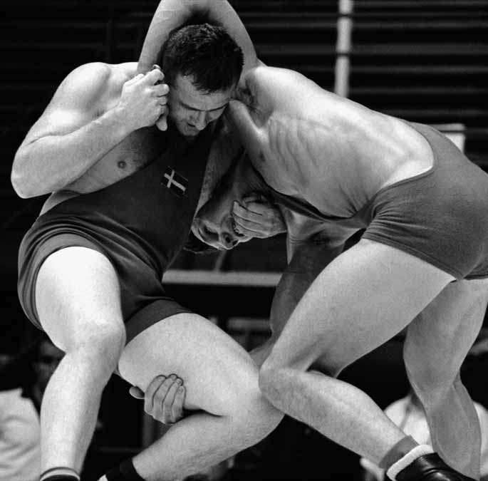 Lennart Eriksson vs Aleksandr Medved, Tokyo1964.jpg